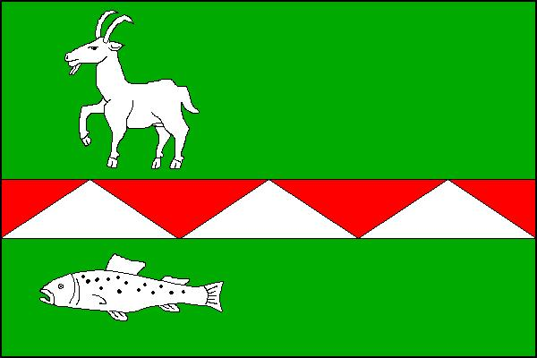 Vlajka obce Pstruží